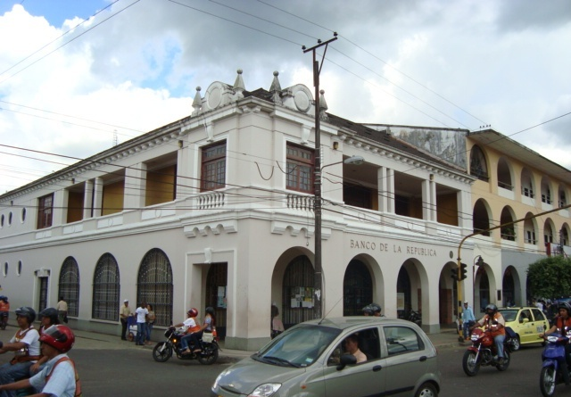 Edificio de la Biblioteca del Banco de la República en Florencia, Caquetá, Colombia